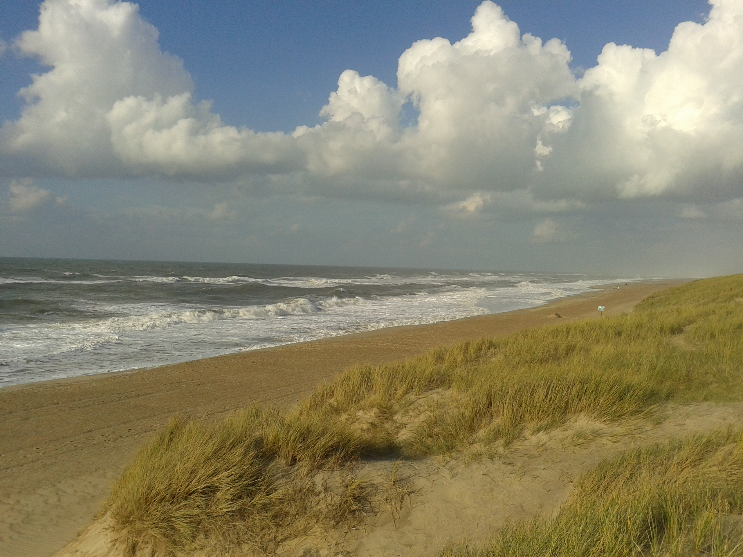 Vejlby Klit Strand